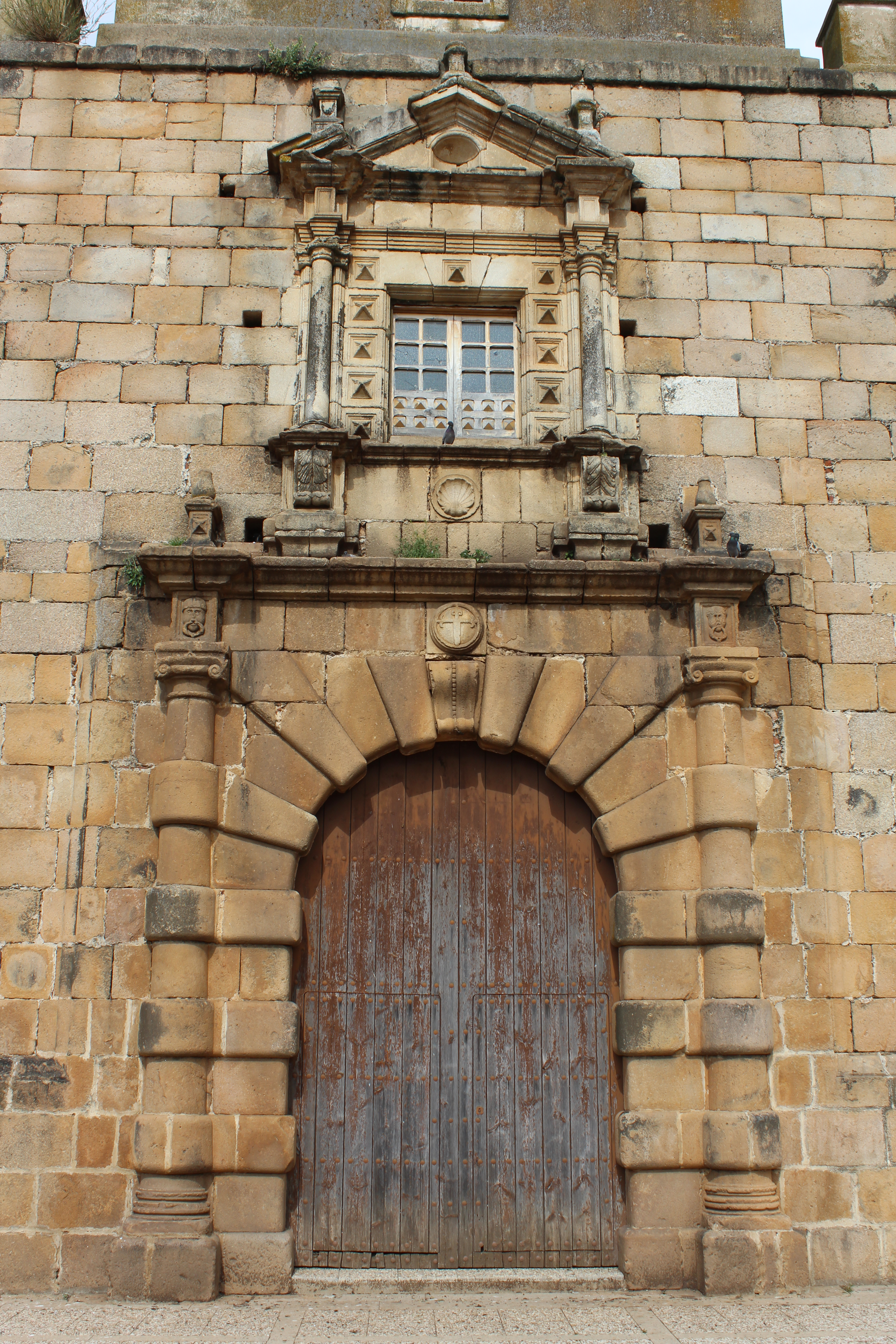 Pórtico de la Iglesia